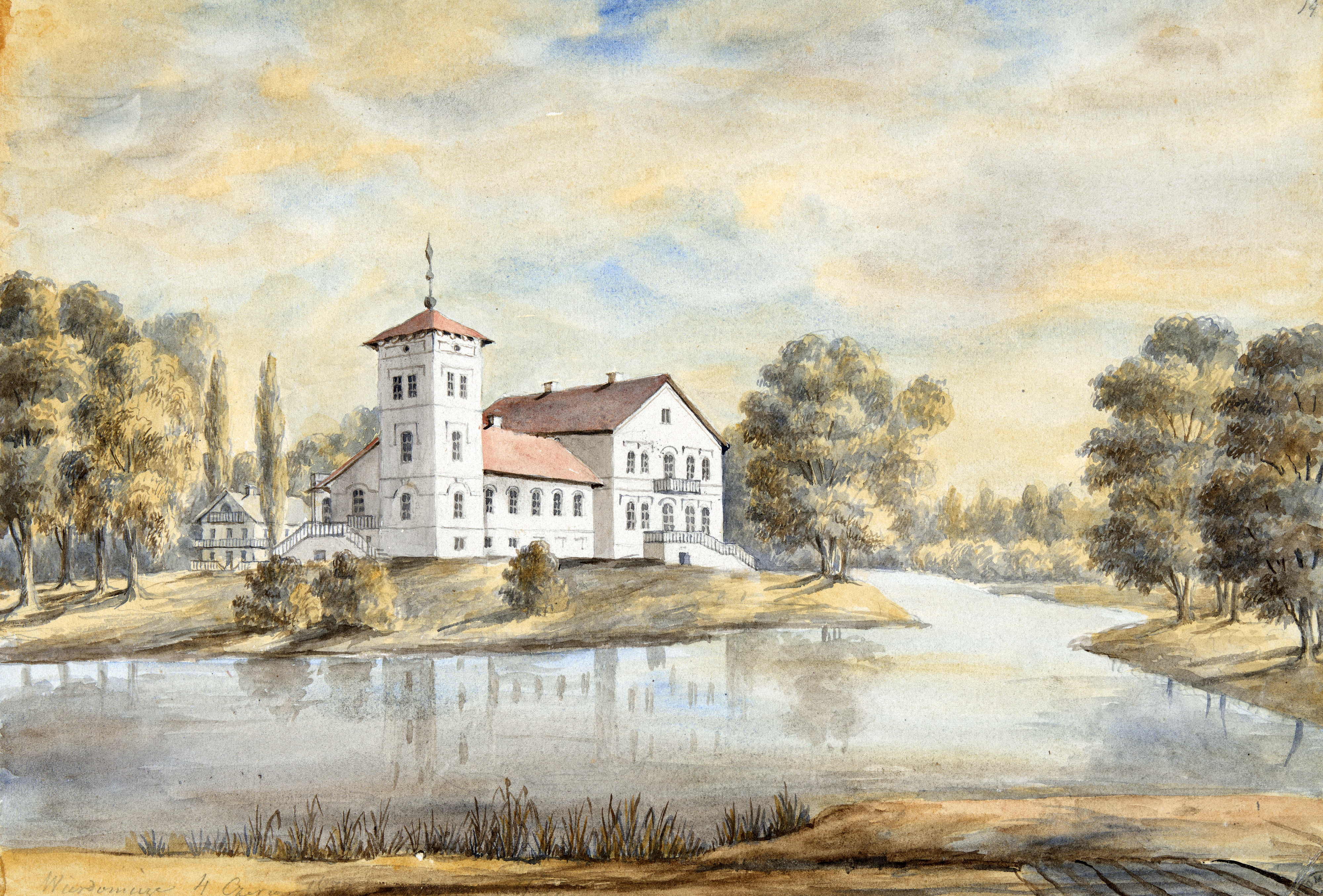 Беларуская (тарашкевіца): Вердамічы (Vierdamičy), сядзіба Талочкаў (Tałočka)